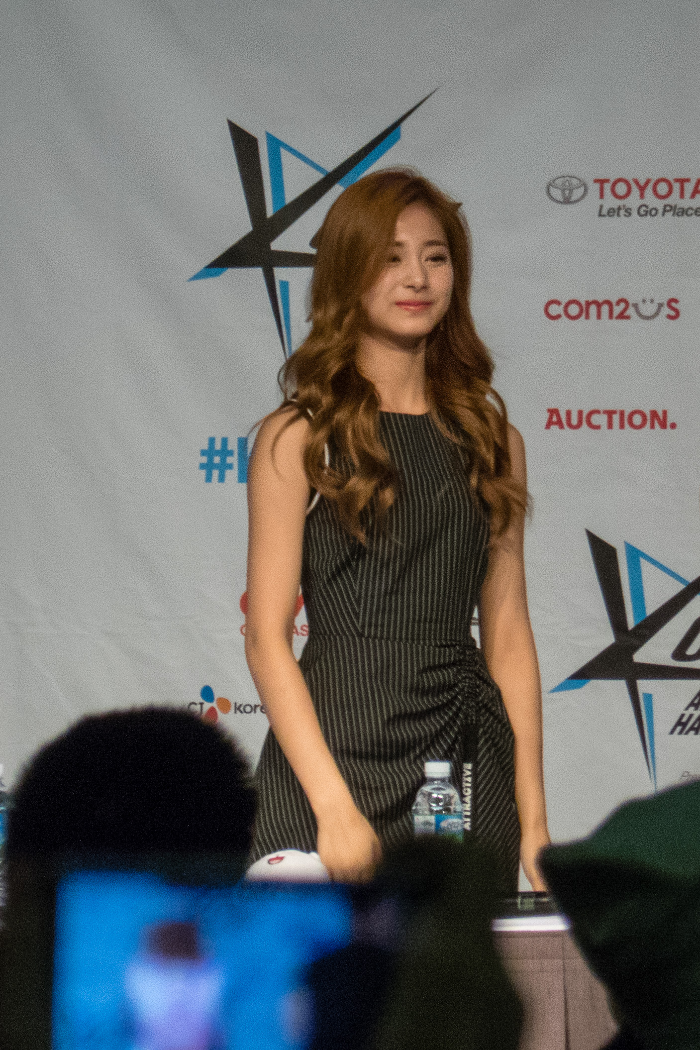 20160731-P1010315 KCON 2016 LA